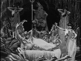 Image du film La Sirène (1904) de George Méliès